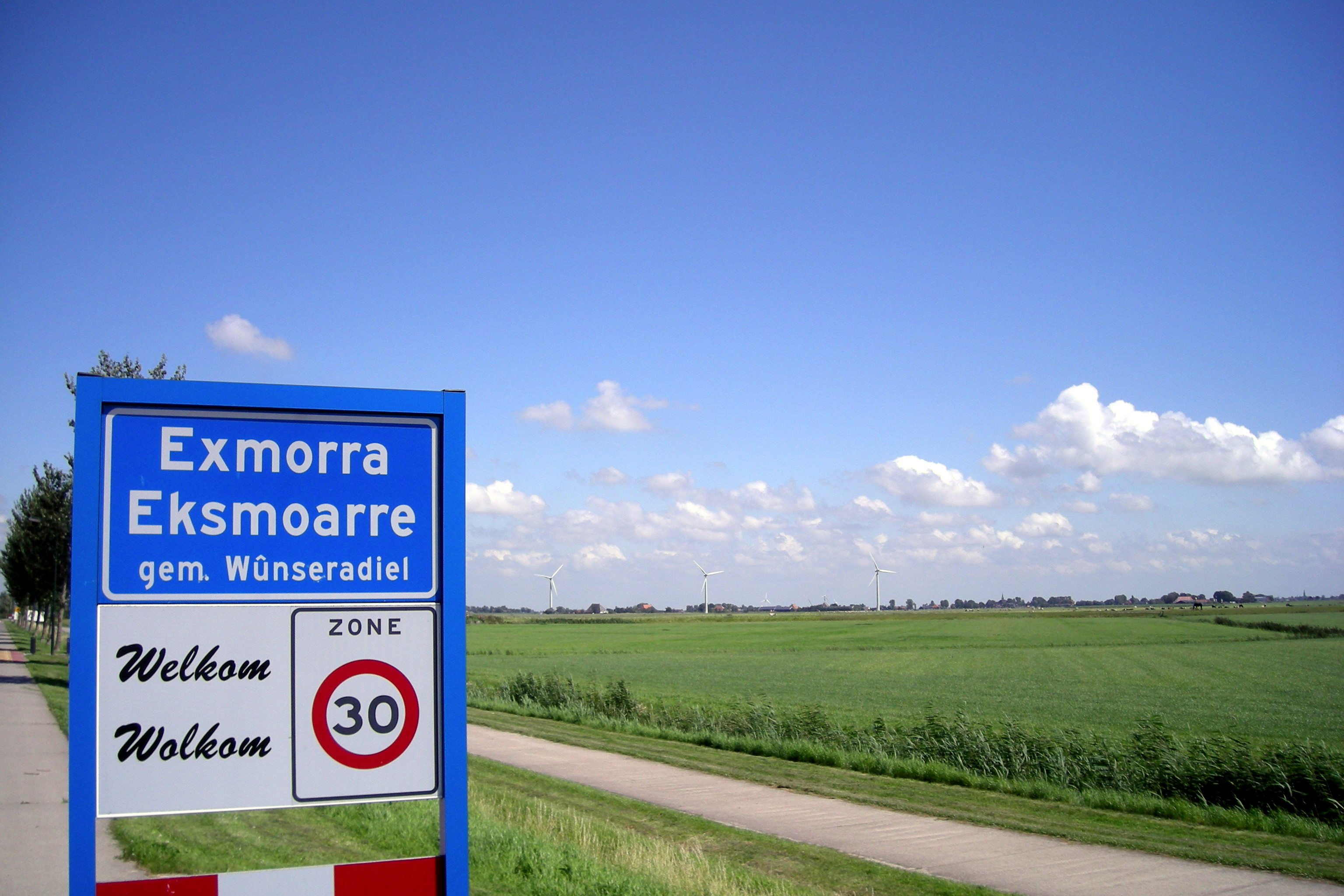 Exmorra